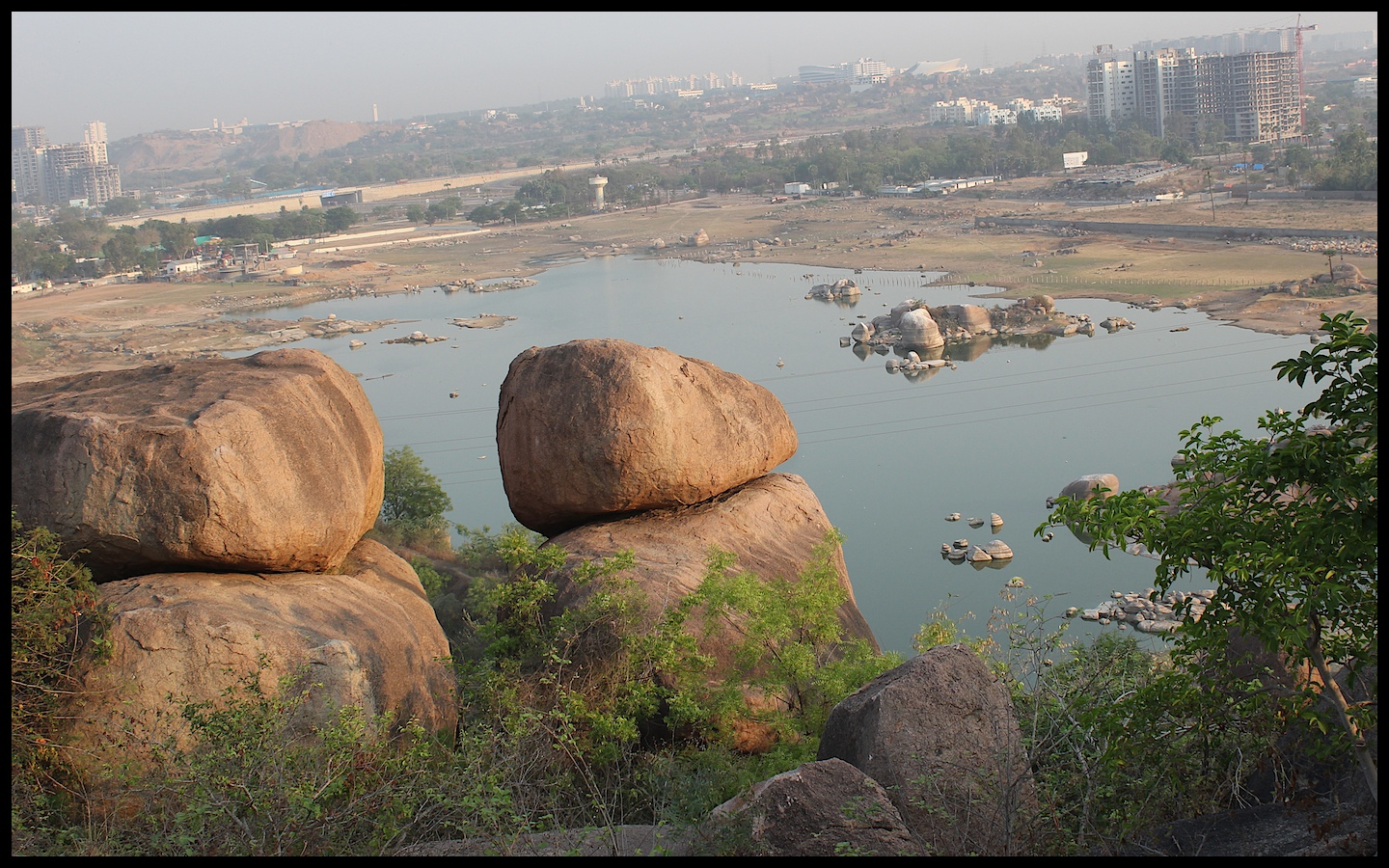 Fakhruddin Gutta. Hyderabad. Apr '13.